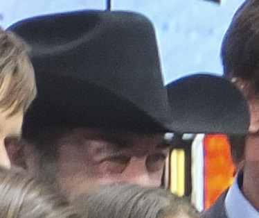 Shaun Johnston en 2015 (HEARTLAND)